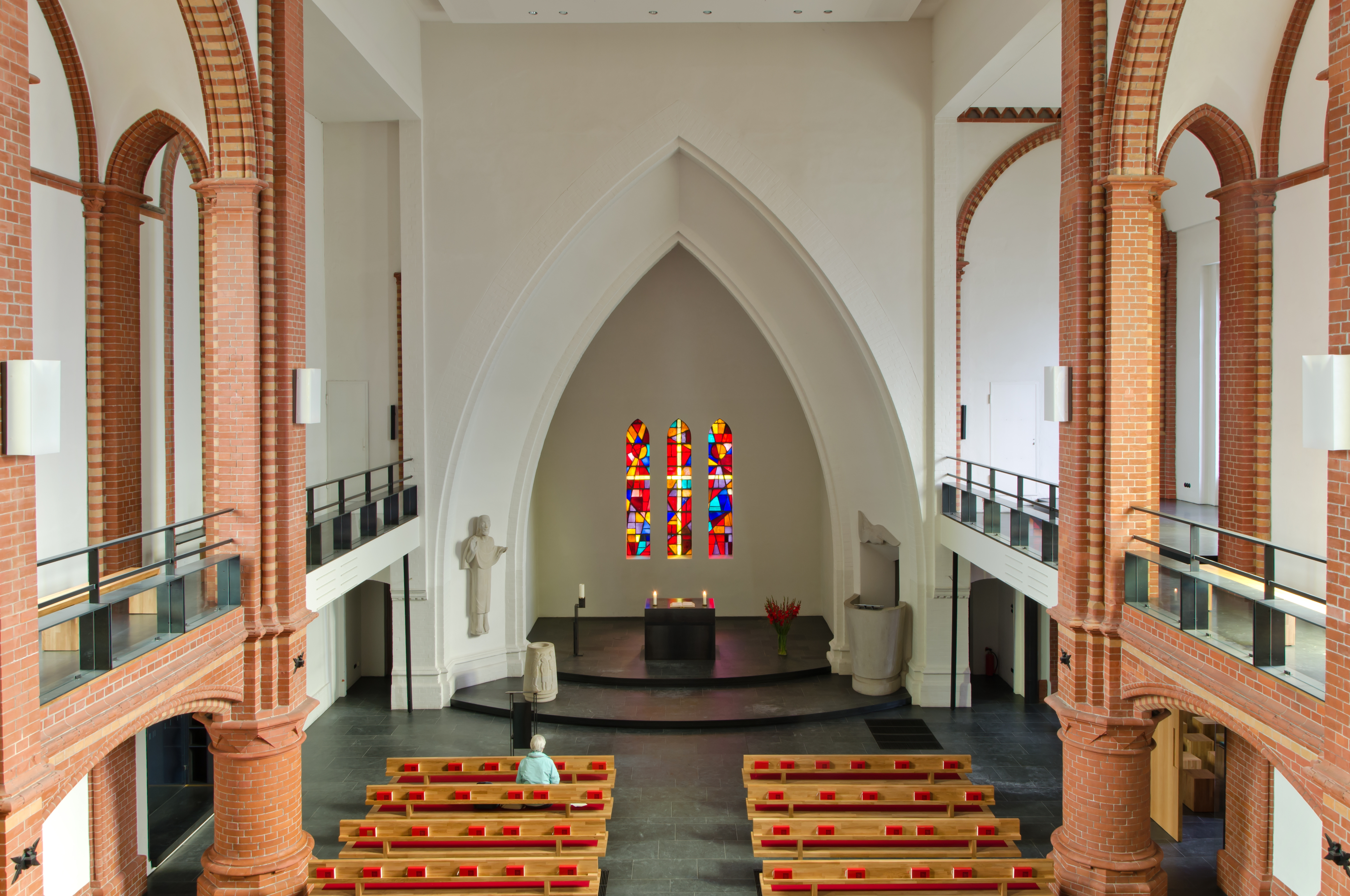 Hamburg Christuskirche Blick von der OrgelemporeThis is a photograph of an architectural monument.